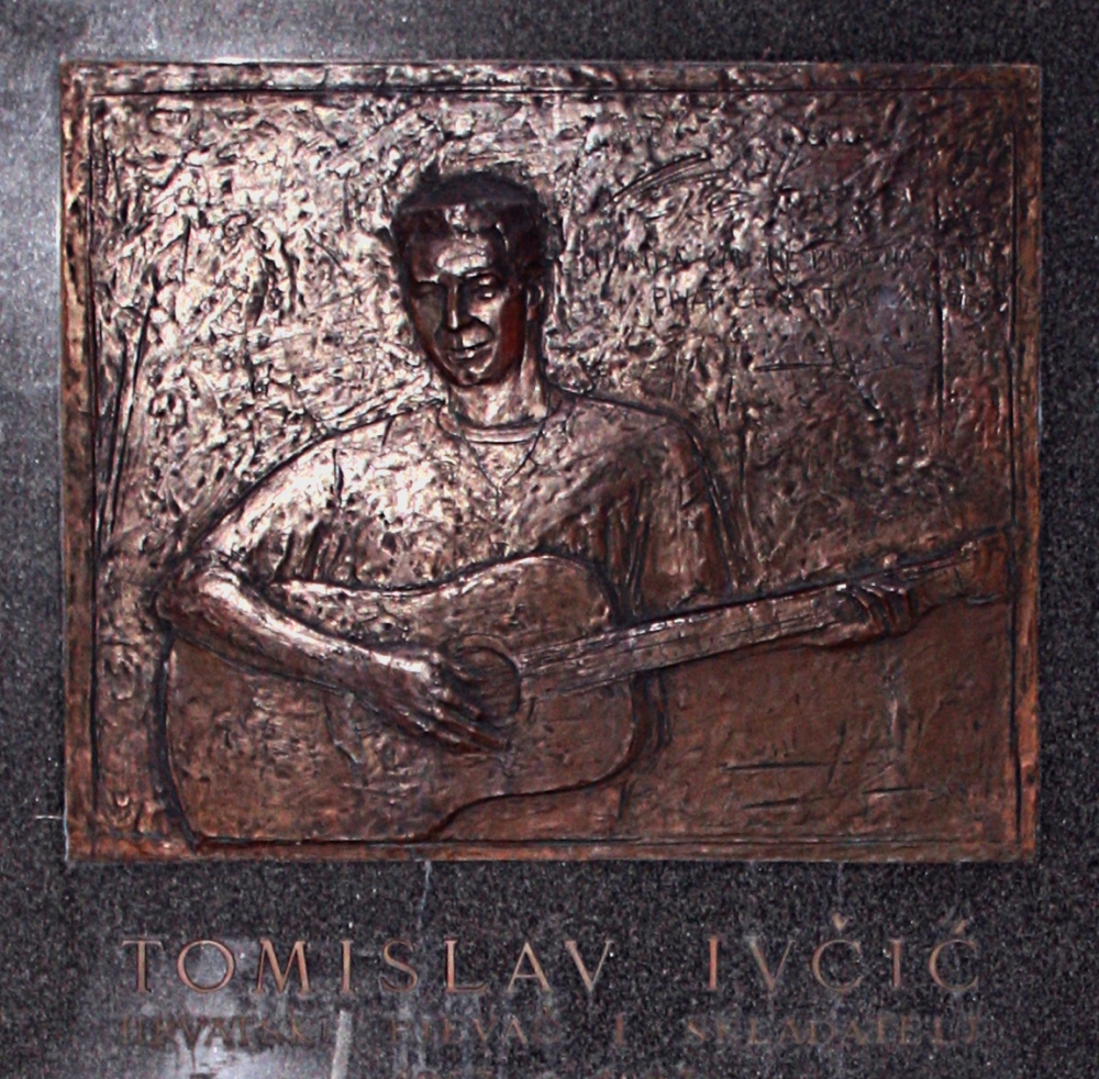 Nadgrobna ploča Tomislava Ivčića na Mirogoju u Zagrebu